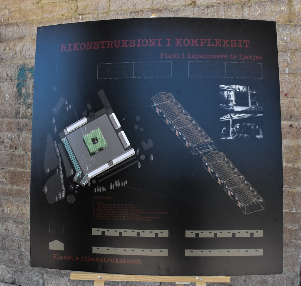 Plani i muzealizimit të Kampit të Tepelenës, projektuar nga Gjon Radovani. Foto nga Loreta Cuka.